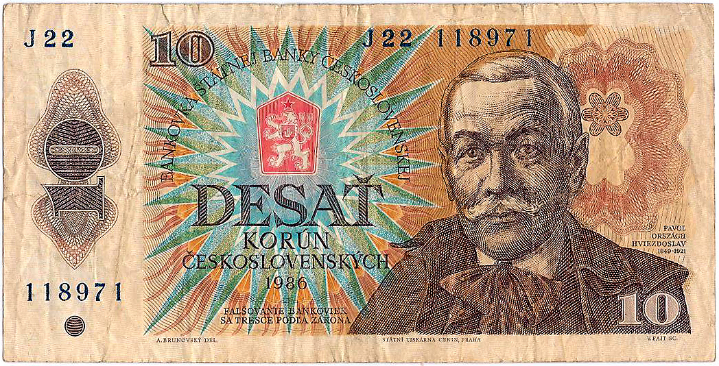 Líc 10 korunovej Československej bankovky. Jej autorom je Albín Brunovský